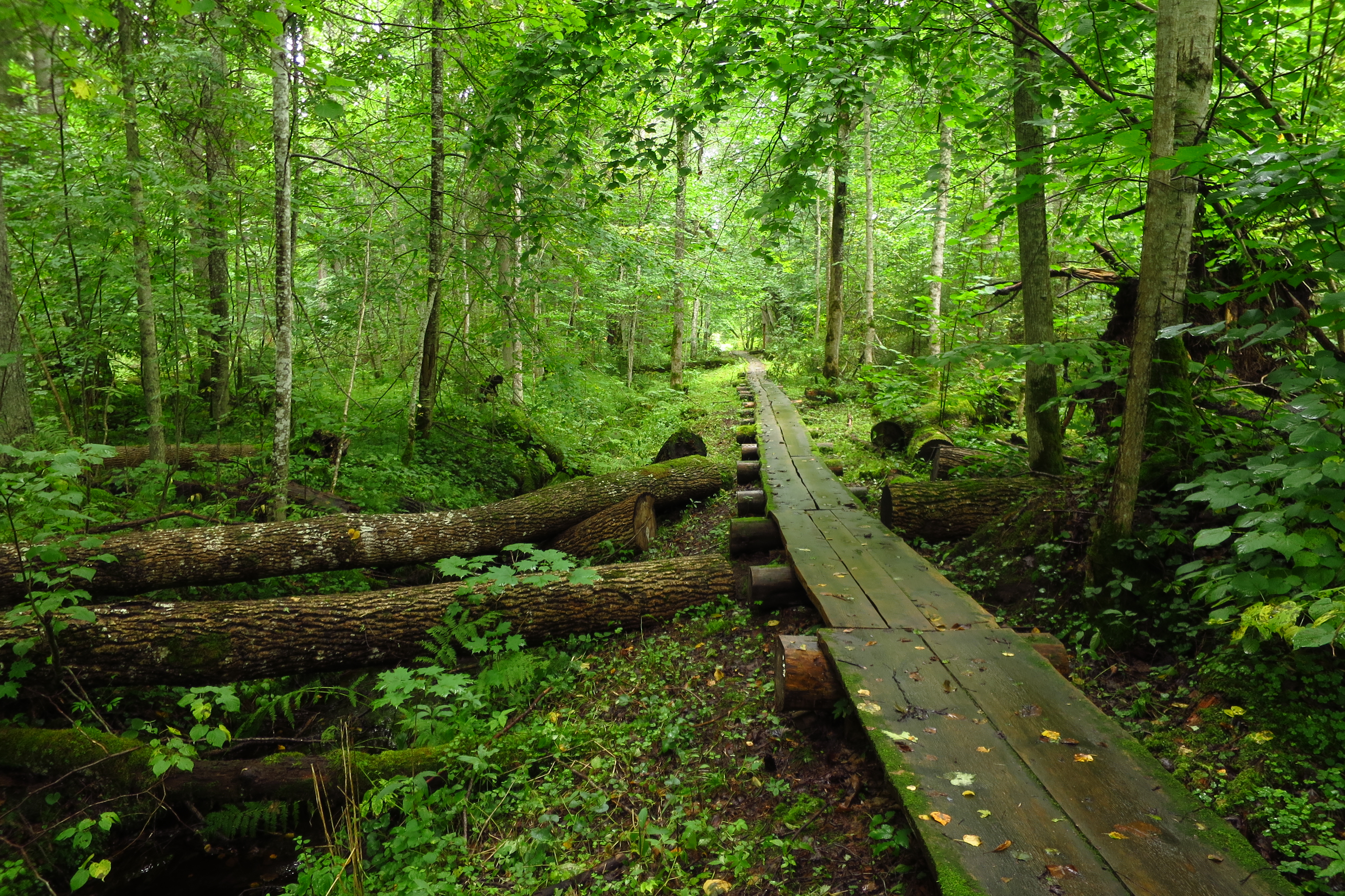 Laudtee Järvselja LKA-l